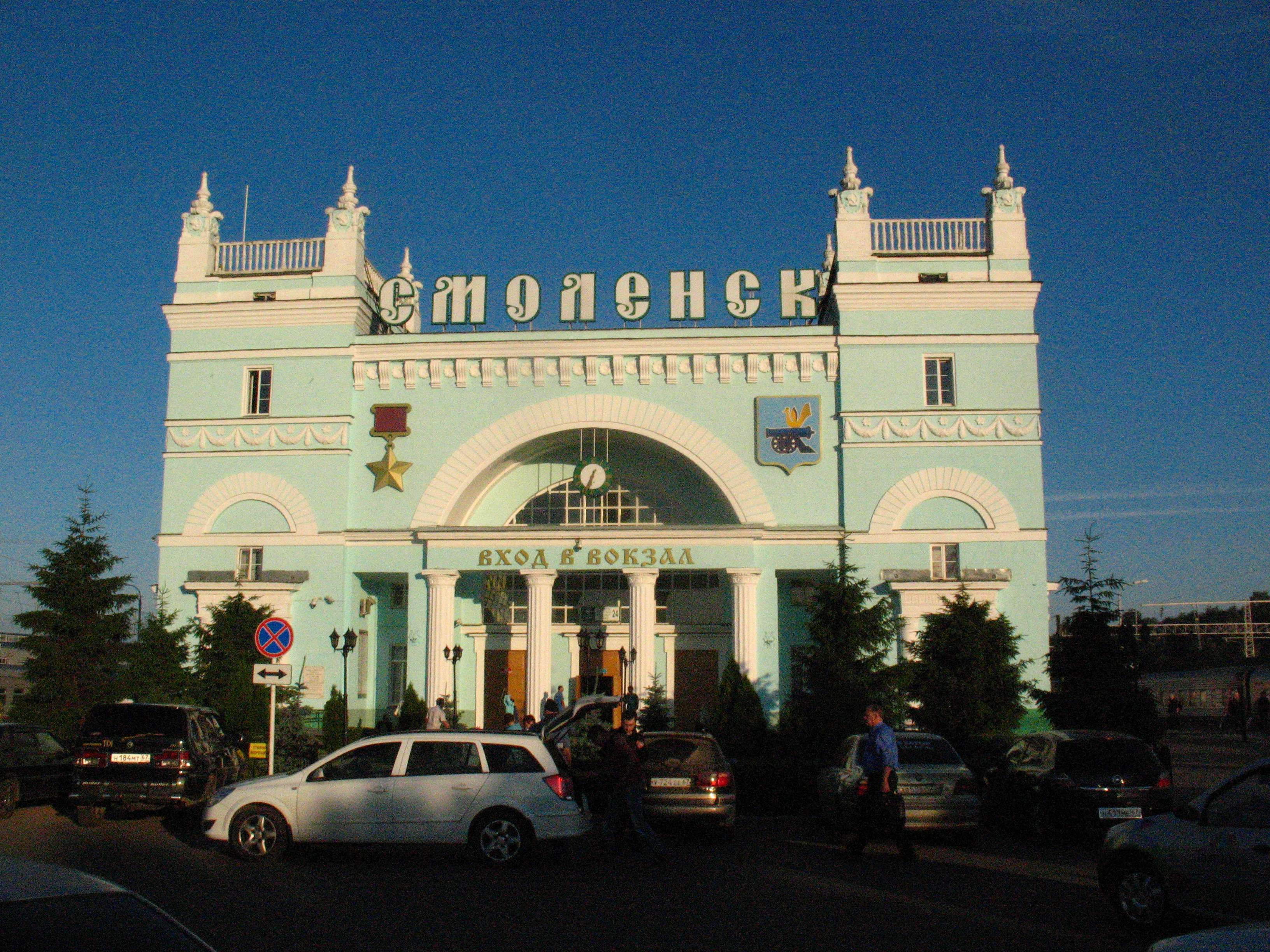 Здание железнодороного вокзала Смоленск-Главный